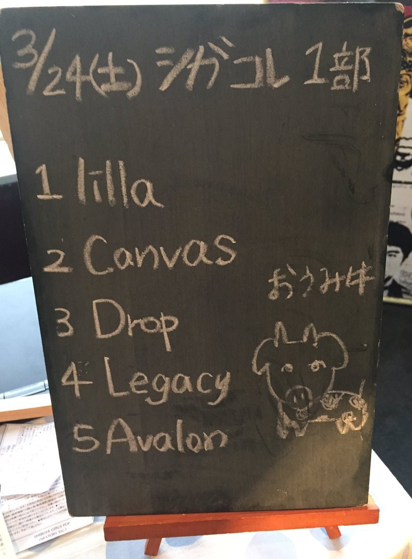 amiinAセトリボード(20180324(1))